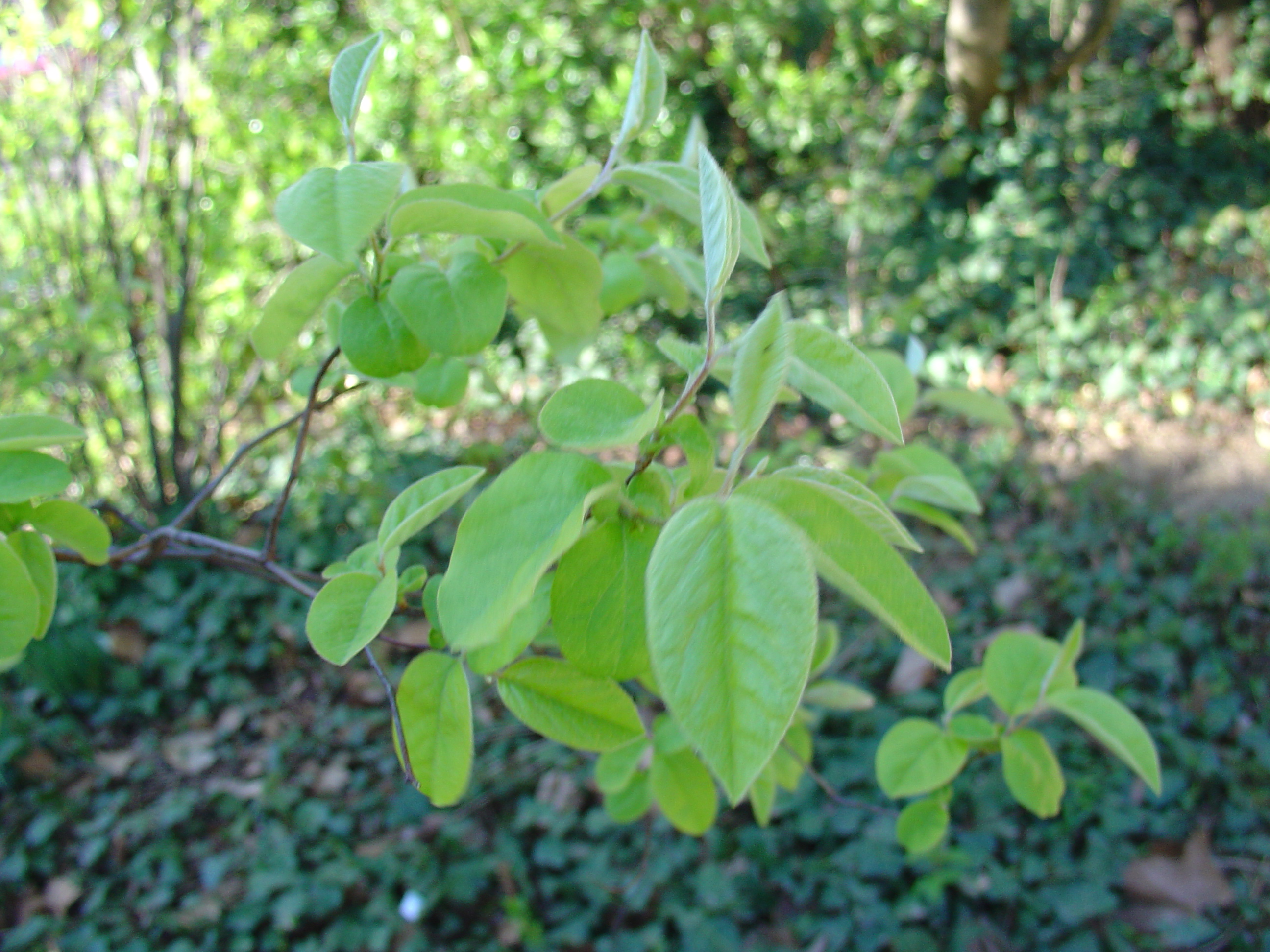 Cydonia oblonga from Valladolid, España